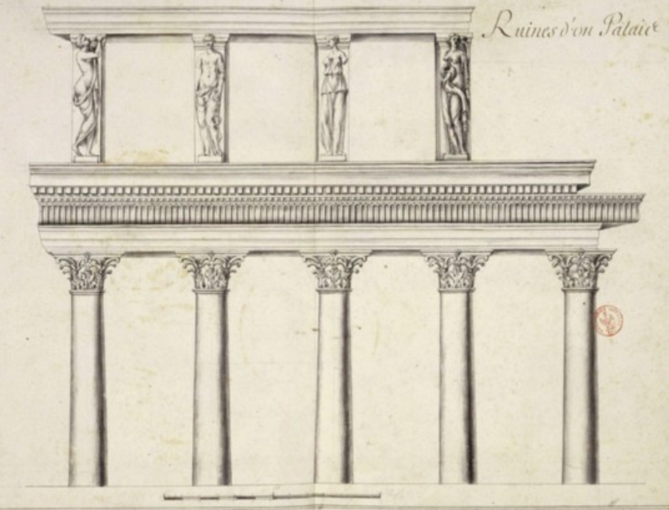 Ruines d'un Palais, Étienne Gravier d'Ortières, 1685